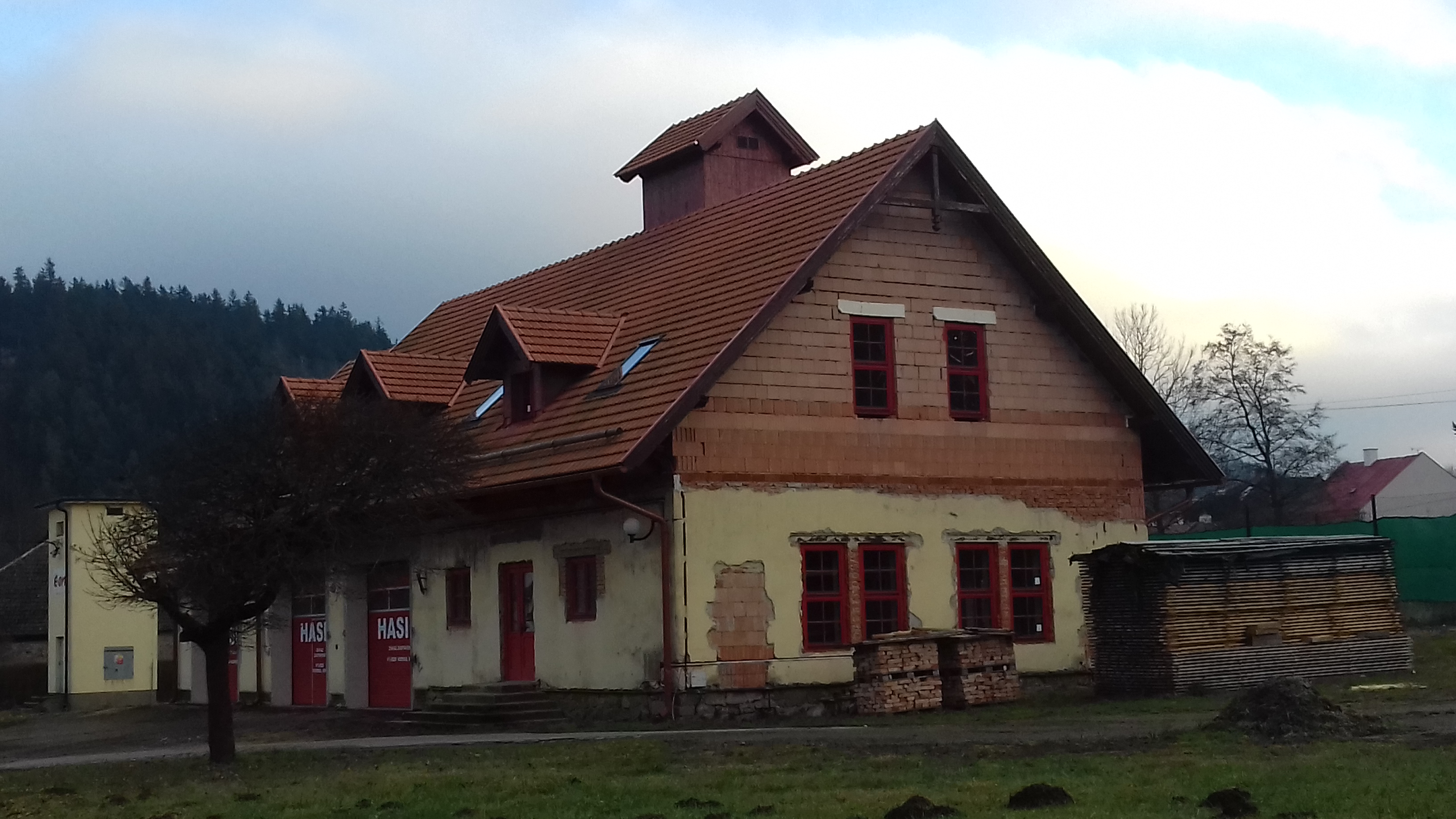 hasičská zbrojnice, U Fryšávky 52, Jimramov.